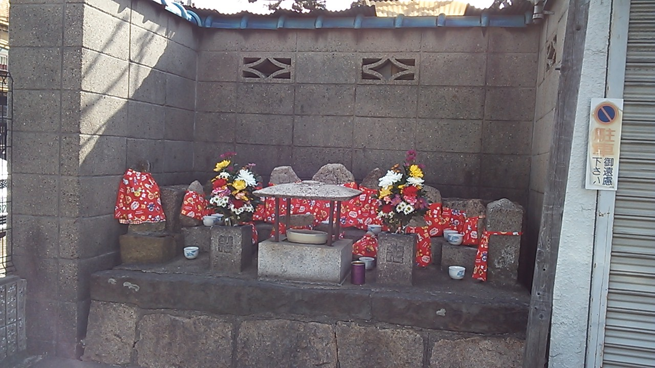 北口地蔵（大阪市東住吉区桑津）